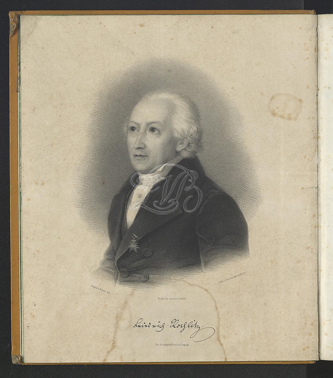 Frontispiz in der gebundenen Ausgabe der in Leipzig erschienenen Zeitschrift Allgemeine musikalische Zeitung. Ausgabe 44 von 1842. Dargestellt ist der im selben Jahr verstorbene Friedrich Rochlitz (1769-1842) als "Brustbild en face", nach einer Zeichnung von August Böhme als Lithografie vervielfältigt von Carl Lange und gedruckt im Königlich Lithographischen Institut Berlin. Unter der faksimilierten Unterschrift Böhmes findet sich der Hinweis auf den Verlag: „Bei Breitkopf & Härtel in Leipzig“ Das originale Buch für diesen zweidimensionalen Scan findet sich in der Bibliothek des Beethoven-Hauses in Bonn. Das Buch stammt aus der Provenienz von Hans Conrad Bodmer aus Zürich und ging 1956 in den Besitz des Bibliothek des Beethoven-Hauses über ...